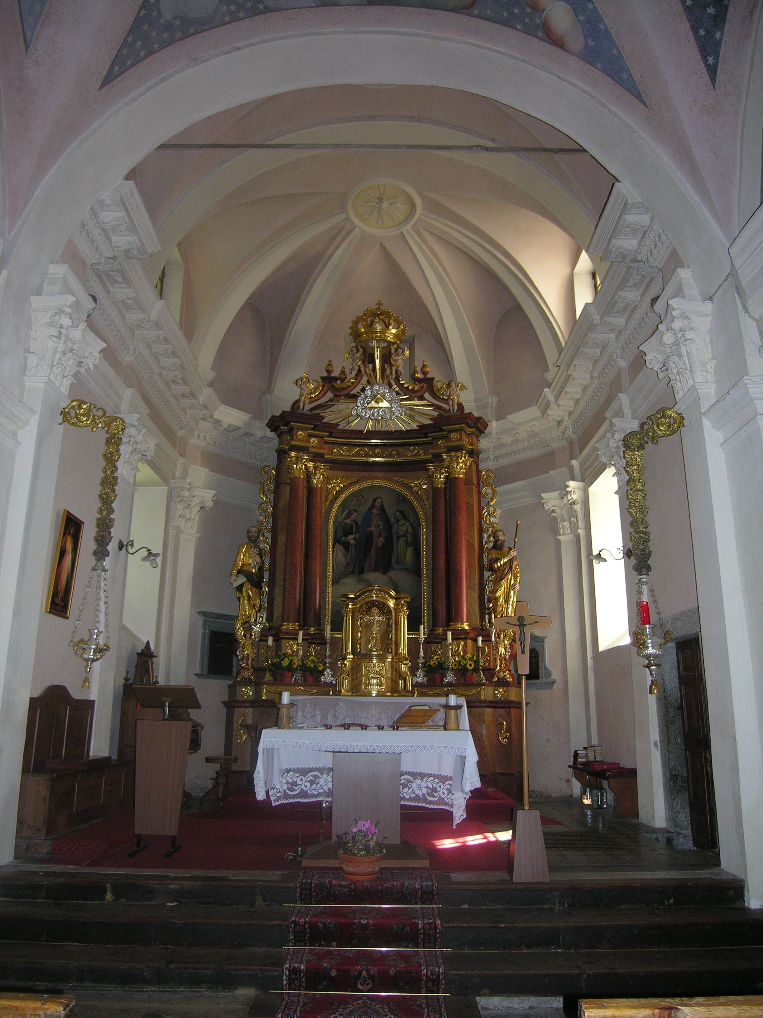 Romos katalikų bažnyčios altorius